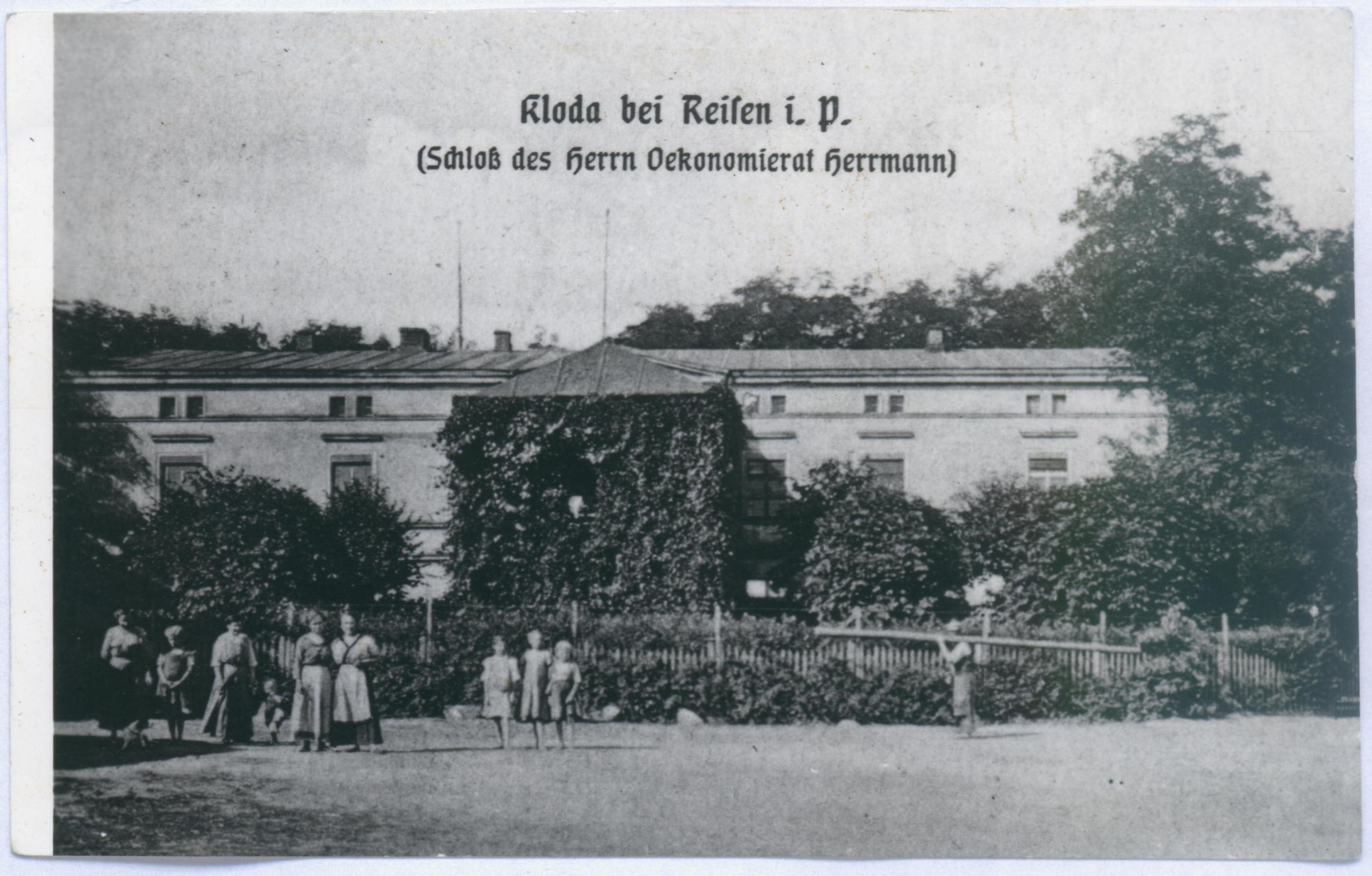 Dwór w Kłodzie w 1915, (skan zdjęcia tradycyjnego z akcji zbierania starych fotografii w Kłodzie)